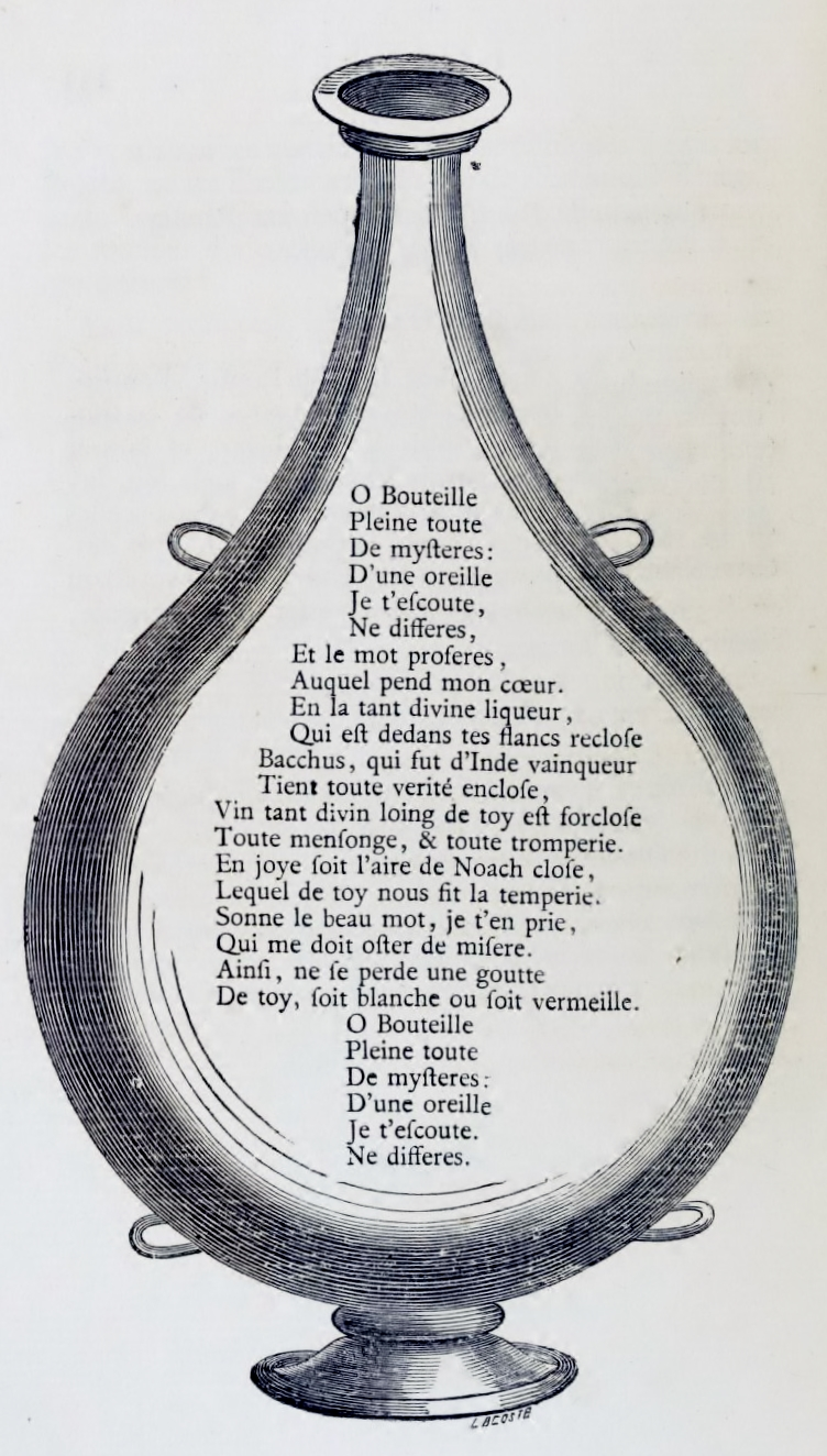 Illustration se trouvant à la fin du Cinquième livre de François Rabelais. Oeuvres de Rabelais, tome V, édité par Niort & Champion, 1880 Editions Niort & Champion, 1880